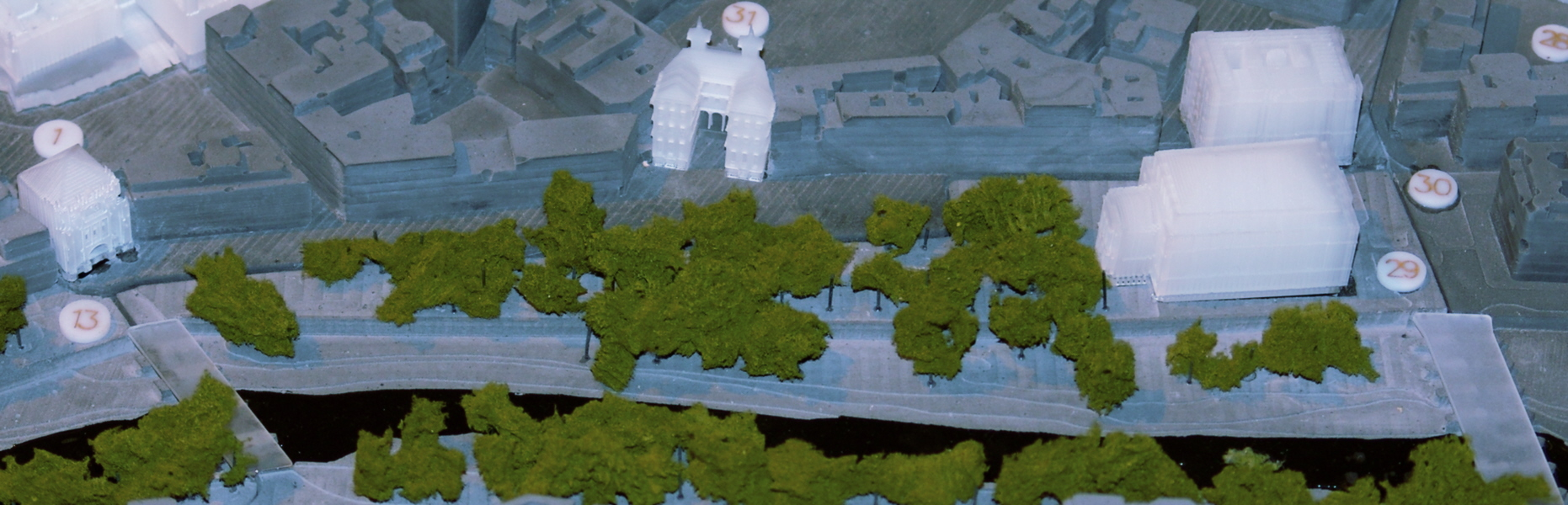 Vista del Paseo del Espolón, maqueta, Burgos, España.